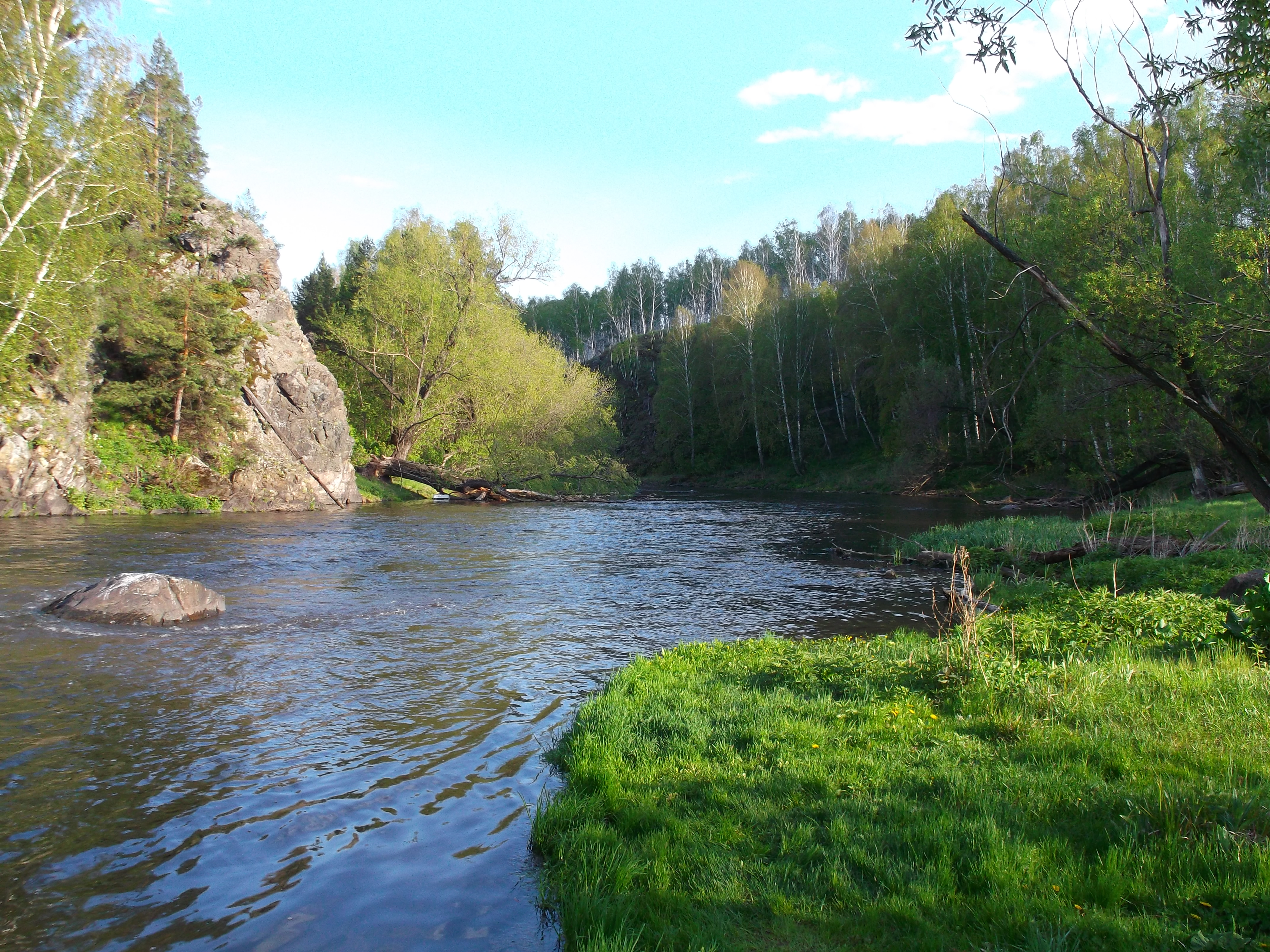 долина р. Миасс (дер. Прохорово)